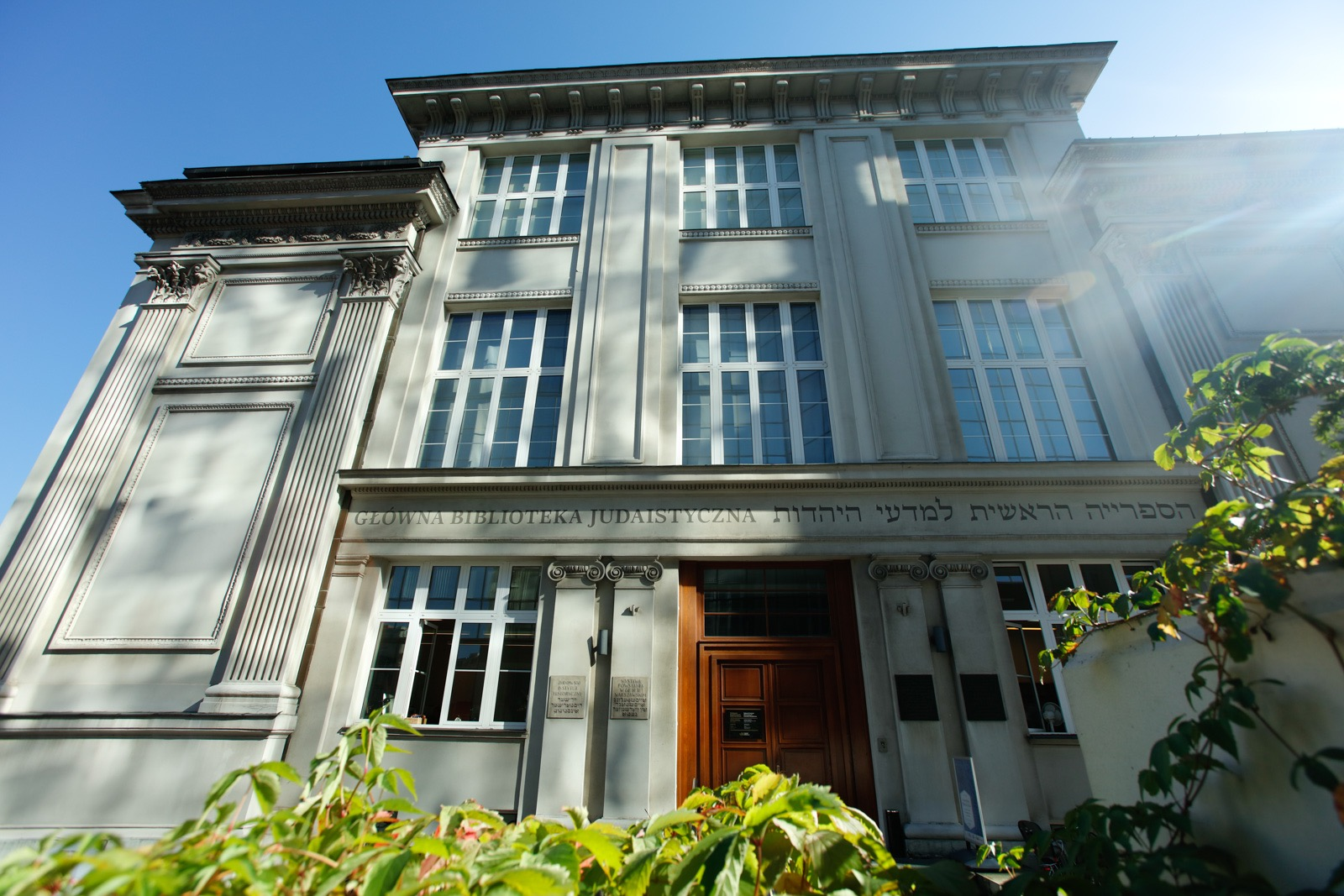 הכניסה לבניין המכון היהודי ההיסטורי בשנת 2017, רחוב טלומצקיה, ורשה